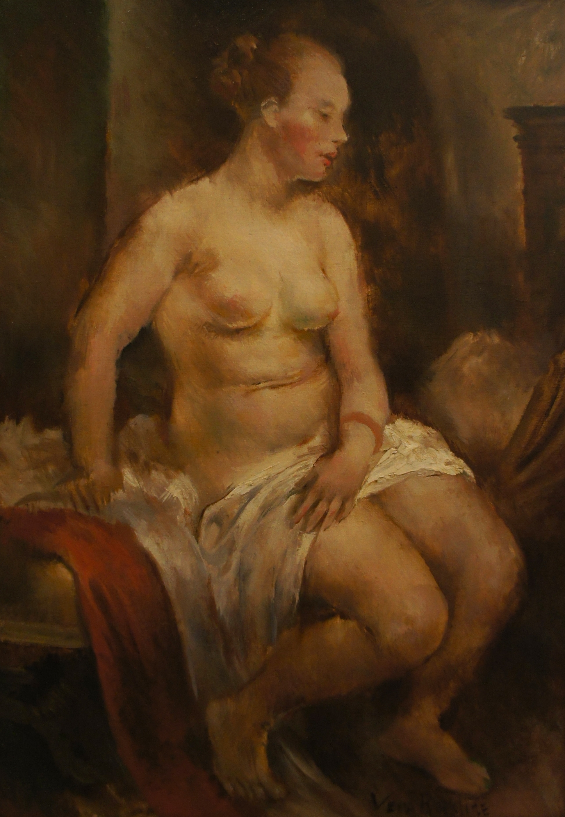 Huile de Vera Rockline